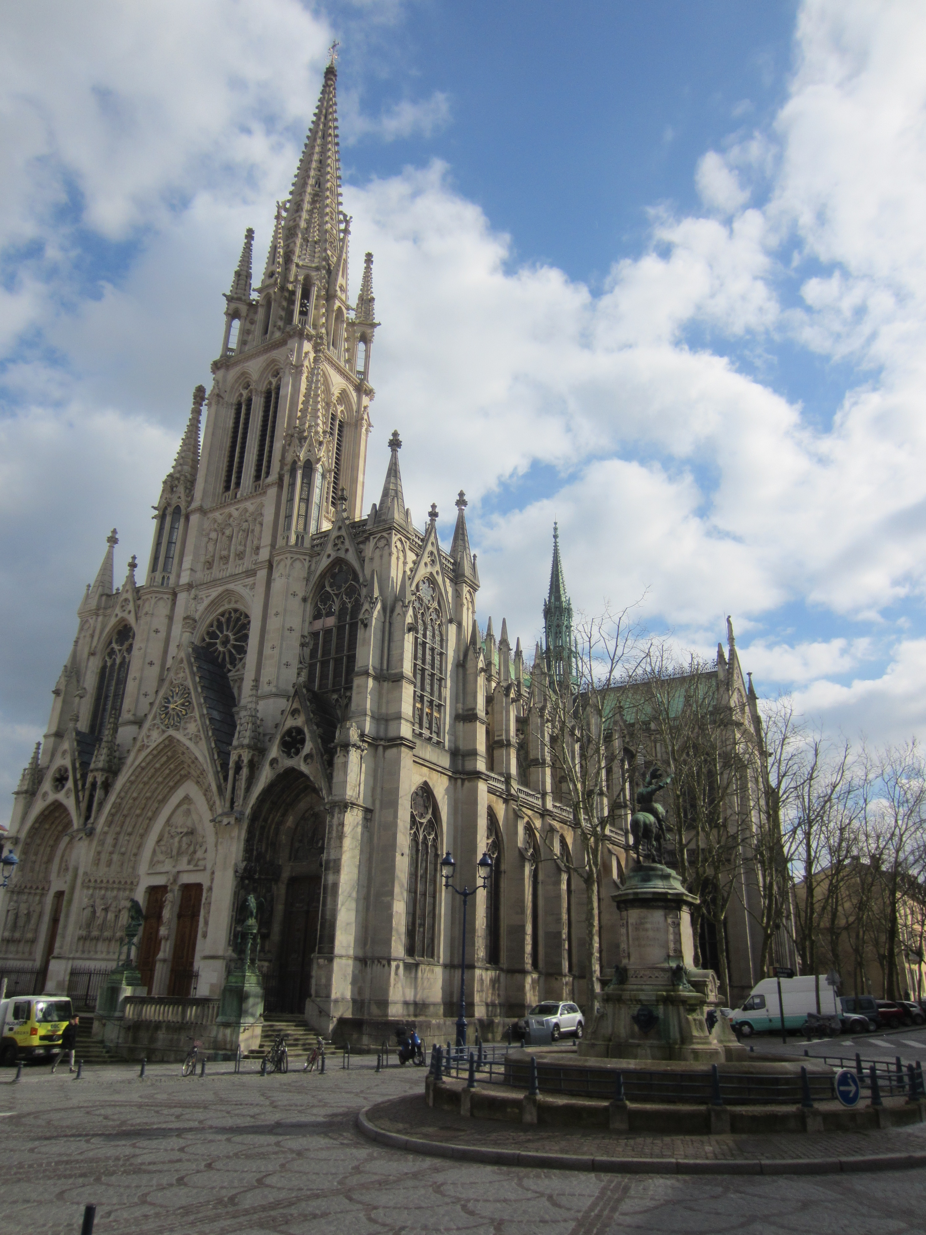 Nancy basilique Saint Epvre